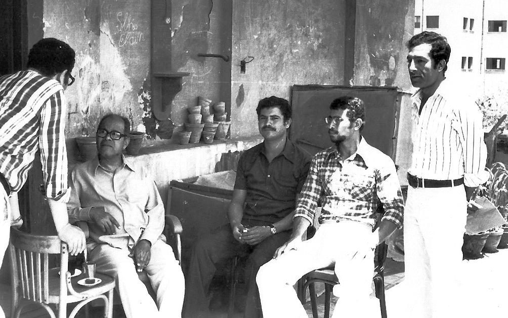 معمل الدكتور اسماعيل علي ابراهيم